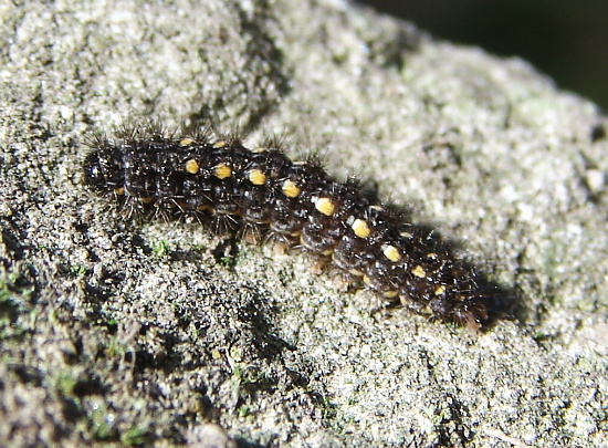 Eilema complana larva